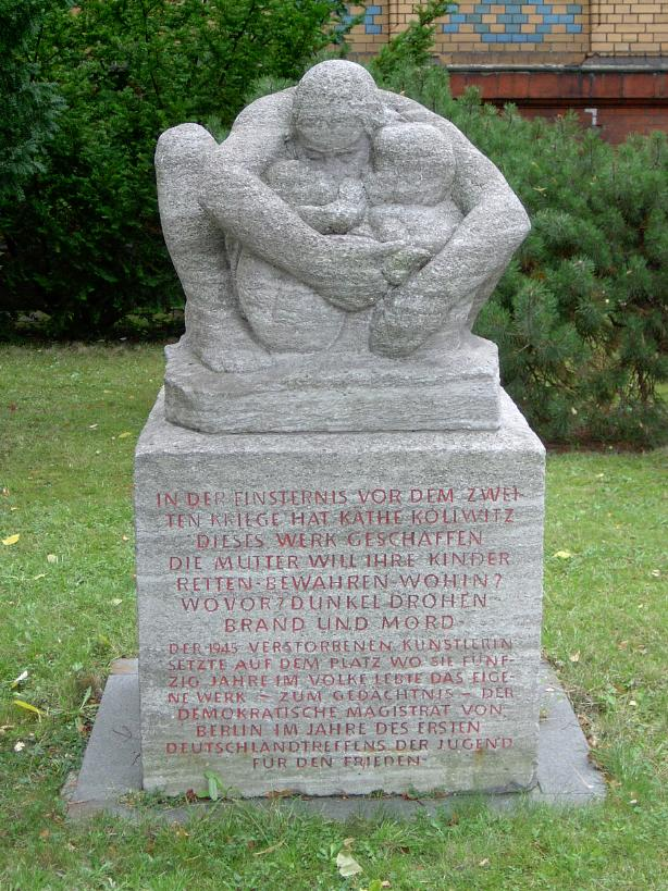 Skulptur aus Muschelkalk „Mutter mit zwei Kindern“ von Käthe Kollwitz (1937/1951). Standort: Gelände des Bezirksamtes Berlin Prenzlauer Berg, Fröbelstraße, Berlin